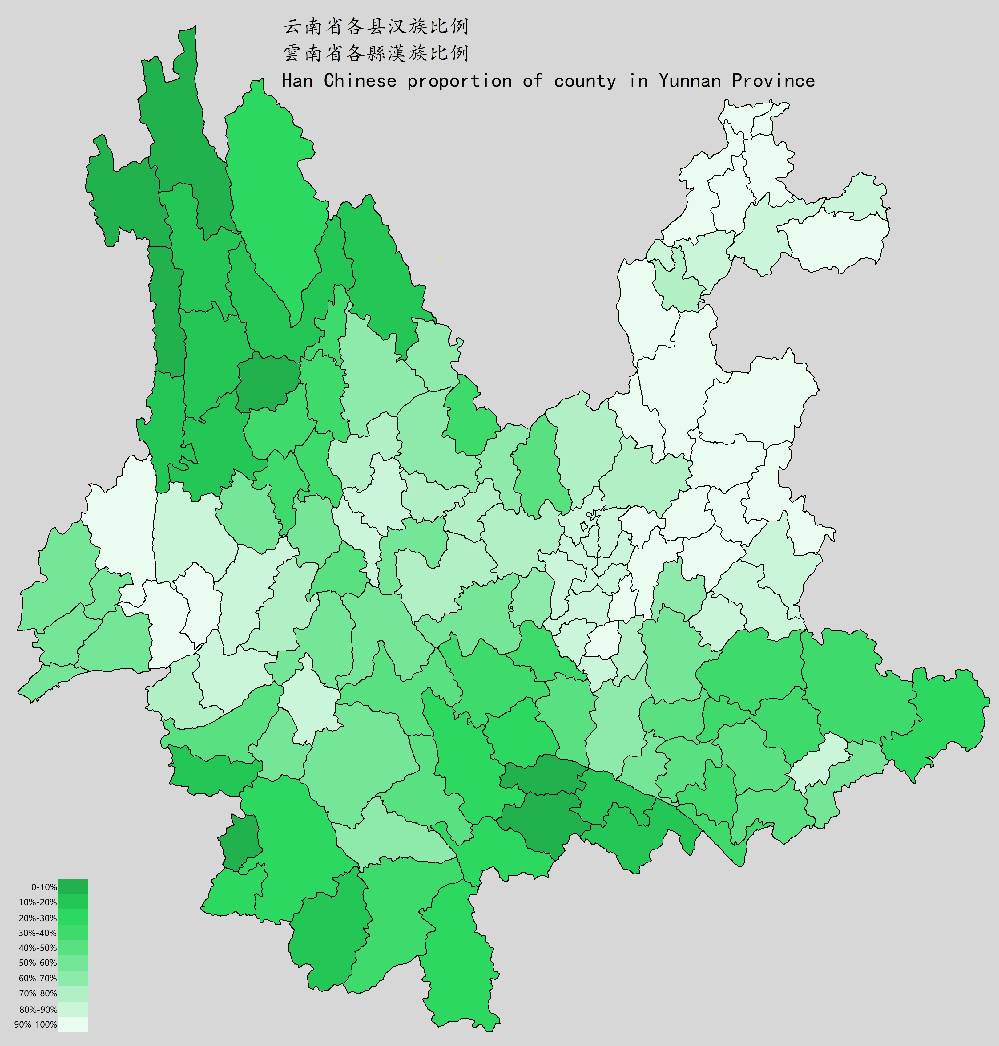 中文（中国大陆）: 云南省各县汉族比例，色越深汉族占比越少